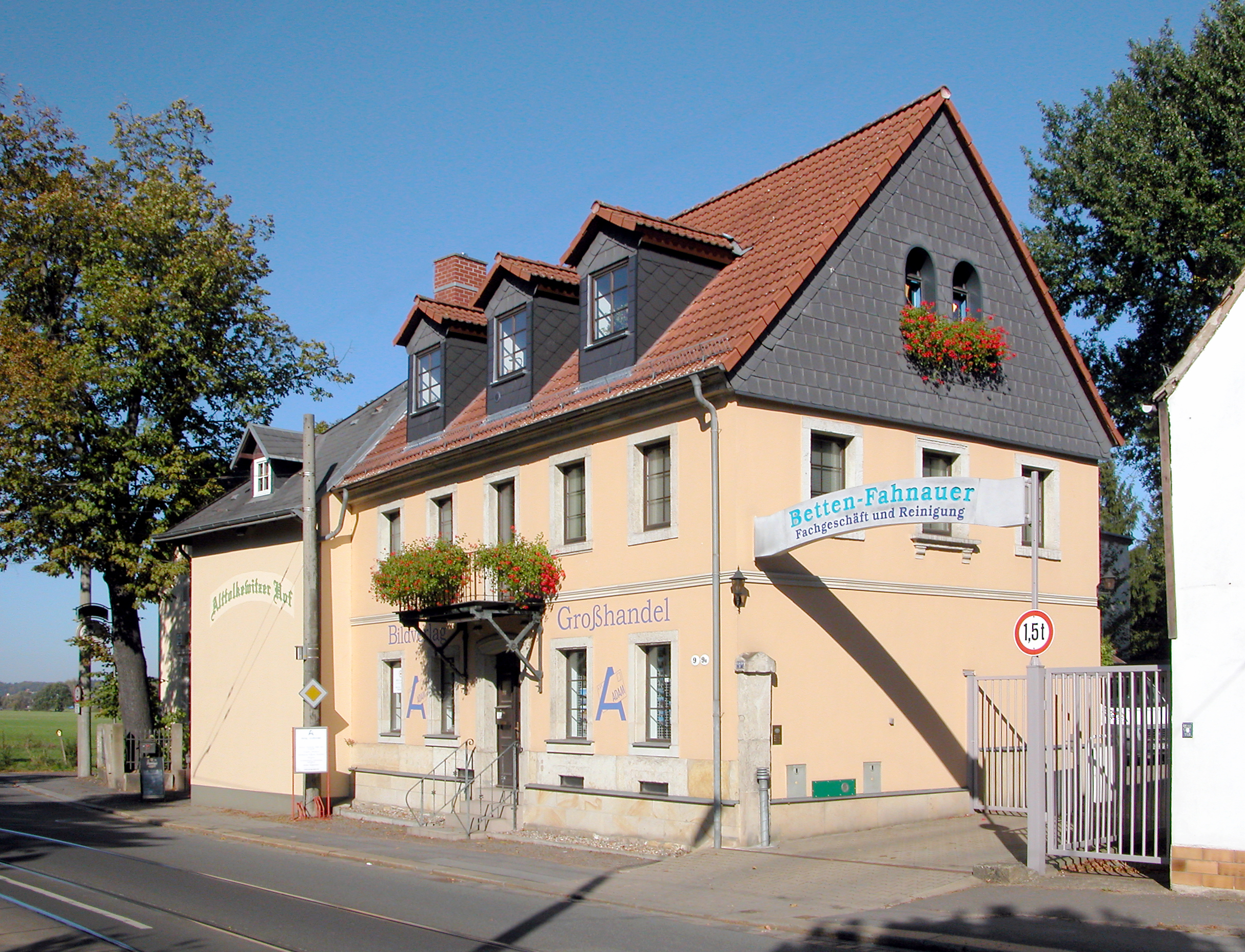 16.10.2011 01279 Dresden-Tolkewitz: Alttolkewitz 9 (GMP: 51.031696,13.830586). Bildverlag Großhandel. 2002 nannte sich das noch "Adam A. und R. Postkartenverlag". Links der beginnende Alttolkewitzer Hof. [DSCNn2903.TIF]20111016730DR.JPG(c)Blobelt